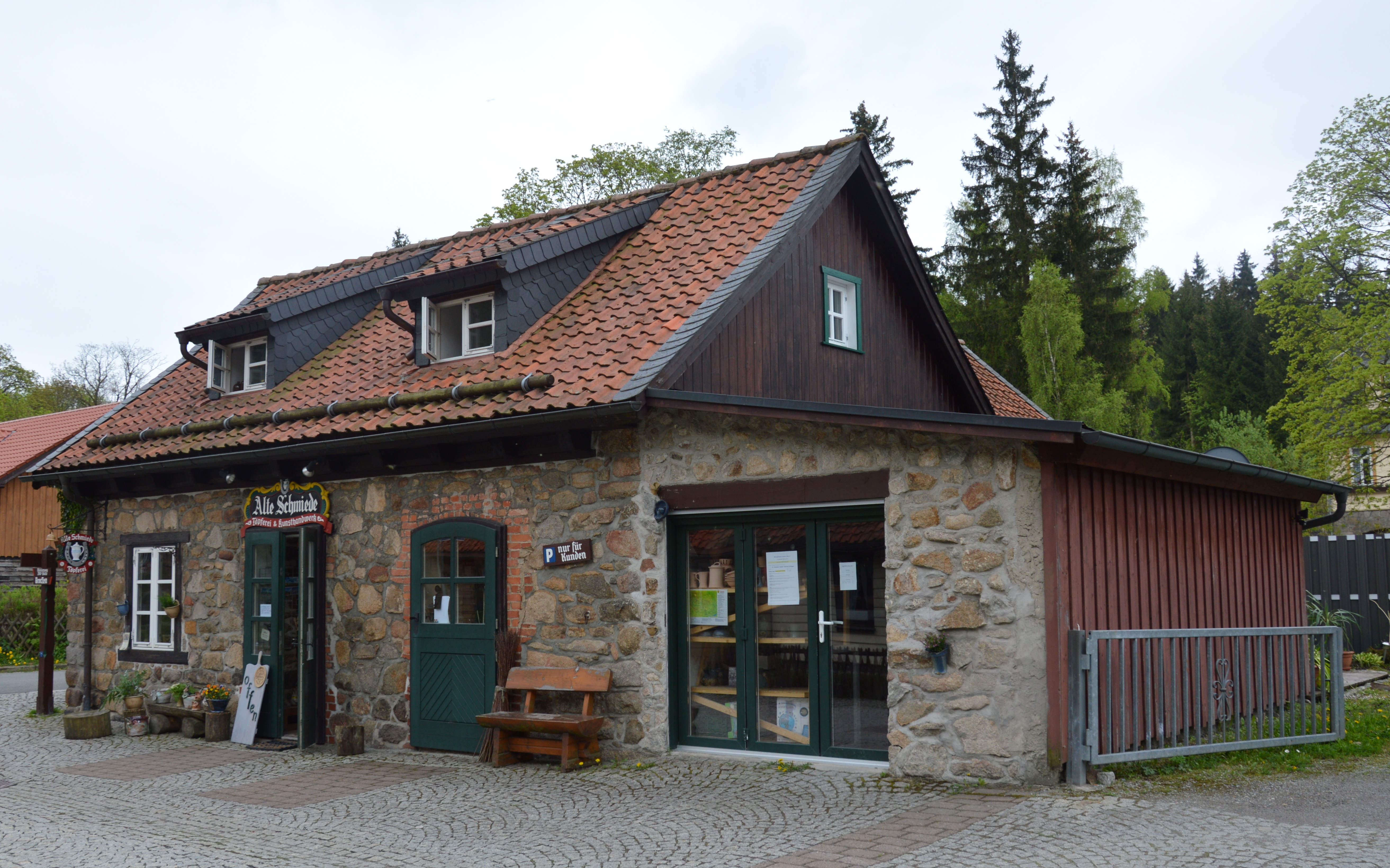 Kirchberg 1b in Schierke